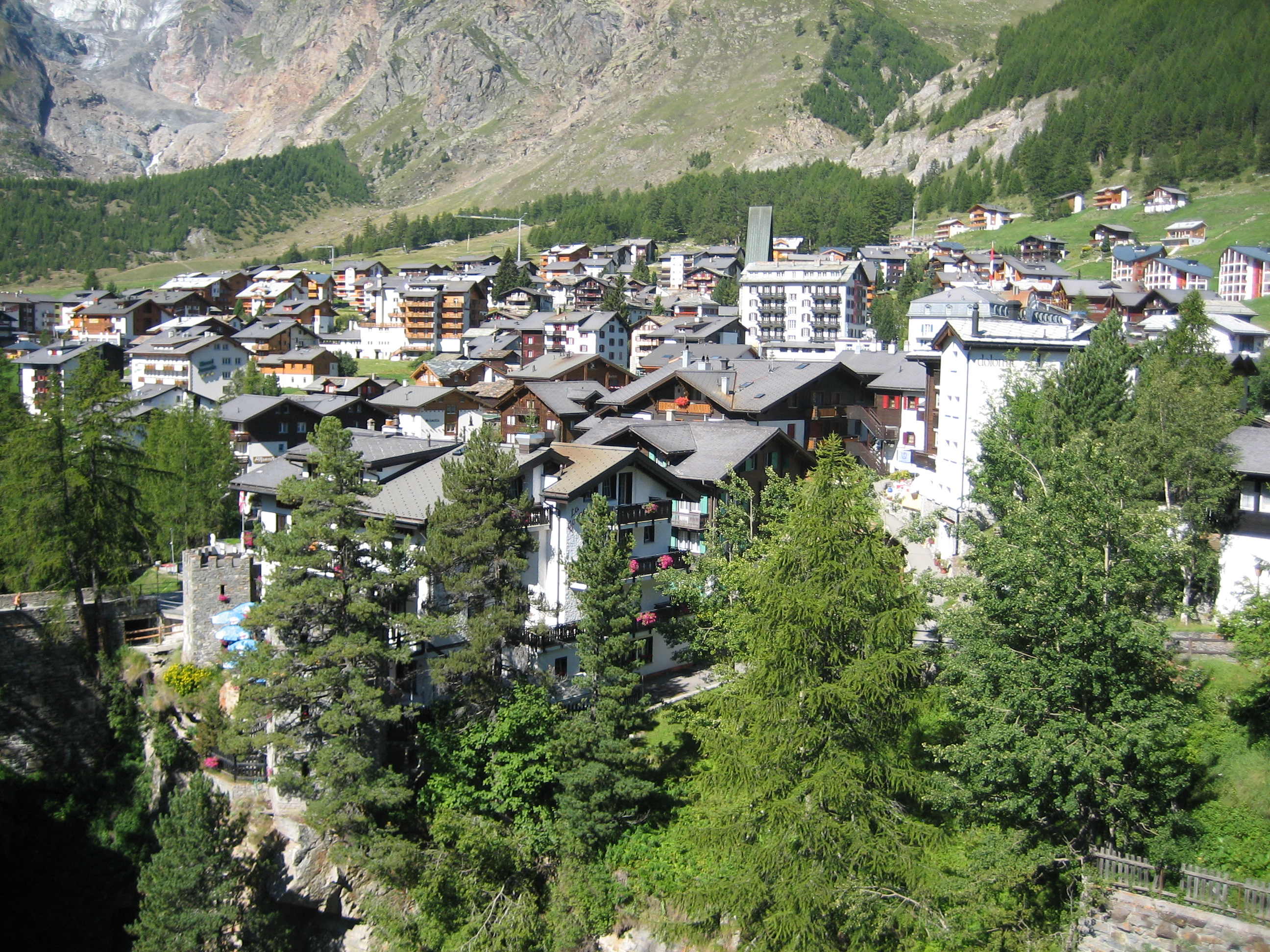 Vue sur le village de Saas-Fee en Valais